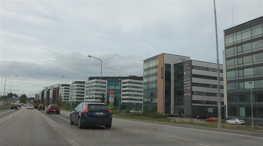 Veromiehen kaupunginosan yritysaluetta heti Kehä III:n pohjoispuolella. Huom: Muista säilyttää viittaus kuvaajaan, mikäli käytät kuvaa.